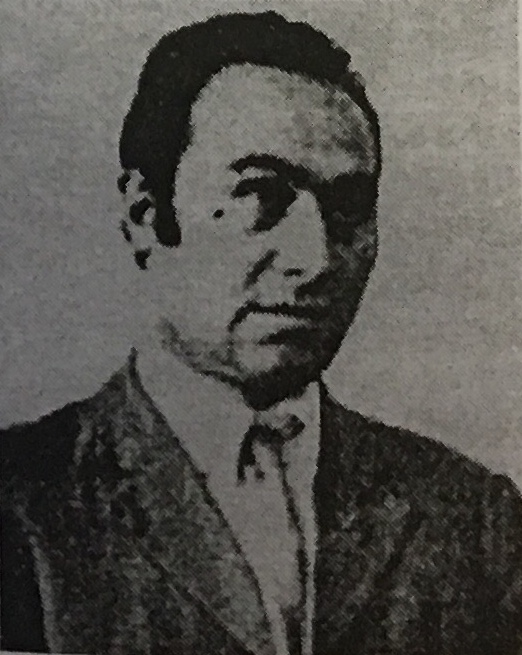 Դավիթ Անանուն (1879-1942)